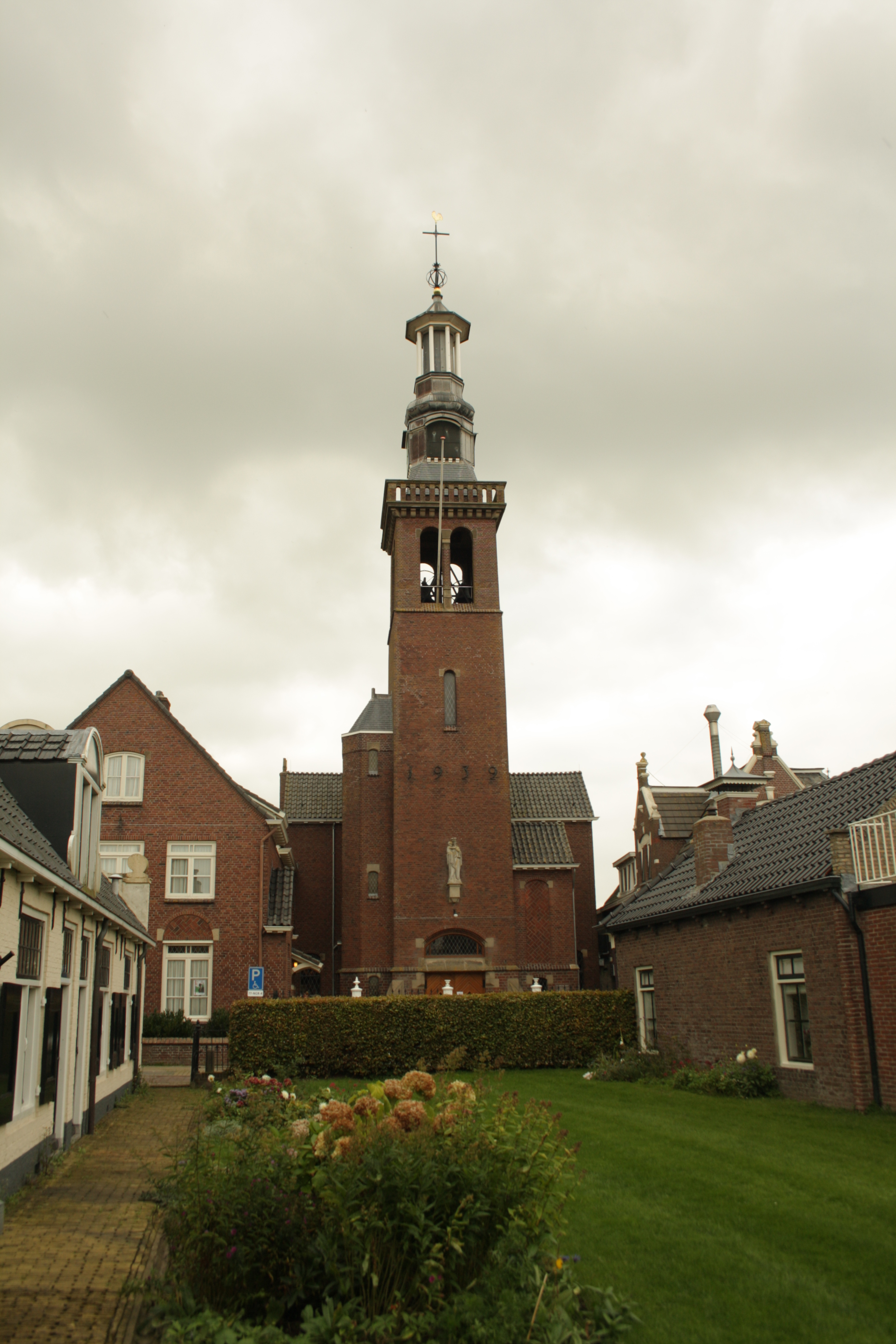 Dronrijp. R.K. Kerk Maria Geboorte. Waterstaatskerk en de op één na oudste kerk van het Bisdom Groningen.